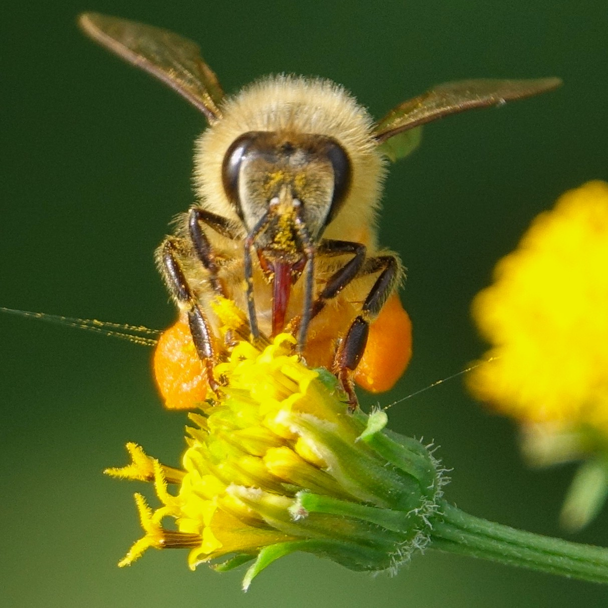 ビーポーレンを運ぶセイヨウミツバチ 日本、東海地方